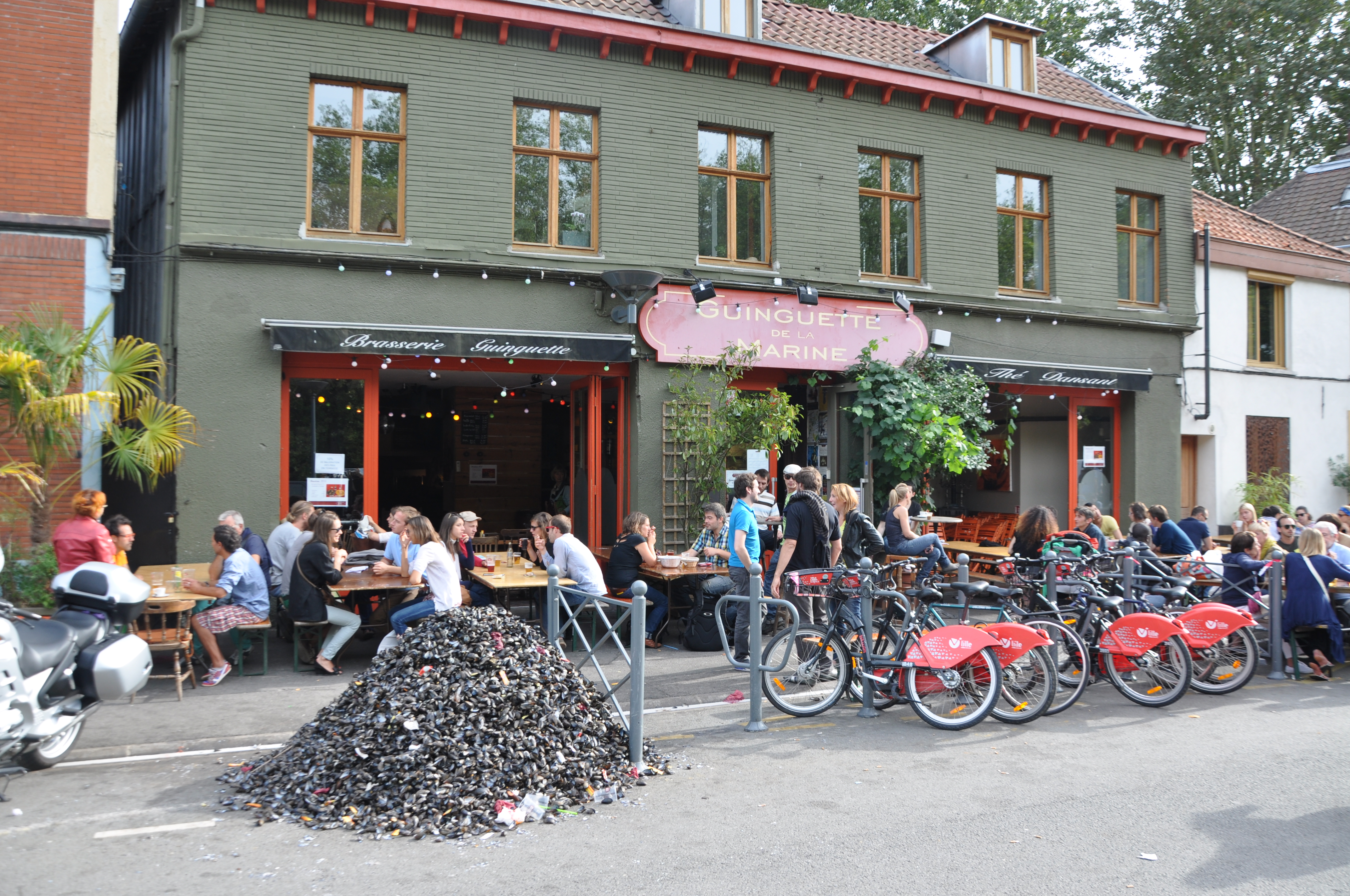 Dégustation de moules-frites, à la braderie de Lille, à la Guinguette de la marine